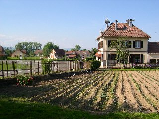 Village de Frais (Territoire de Belfort), la mairie Photo prise en mai 2004 par LP90 Licence GFDL LP90 mai 2004